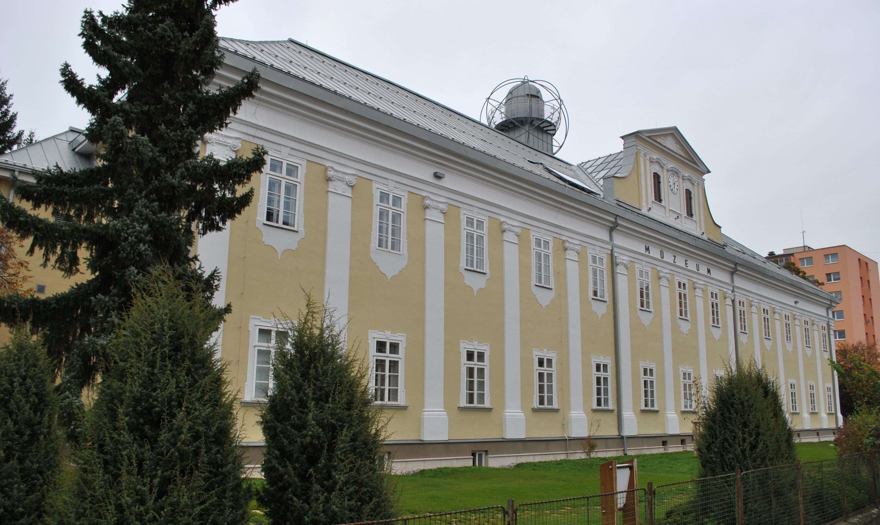 Múzeum